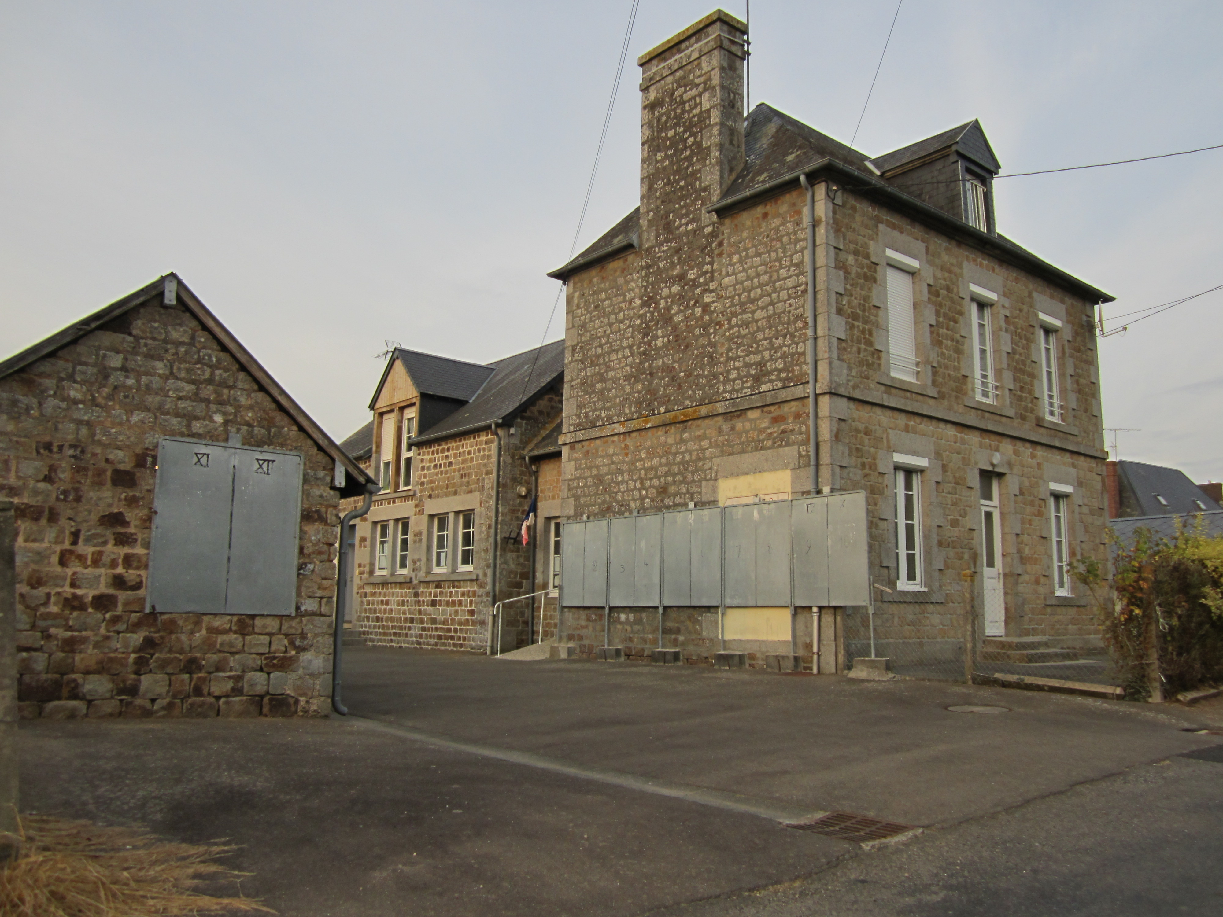 Sainte-Marie-du-Bois, Manche